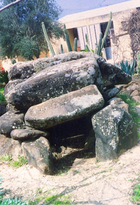 דולמן ליד אחד מבתי המגורים בקיבוץ